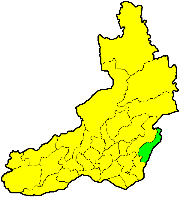 Нерчинско-Заводский район на карте Забайкальского края